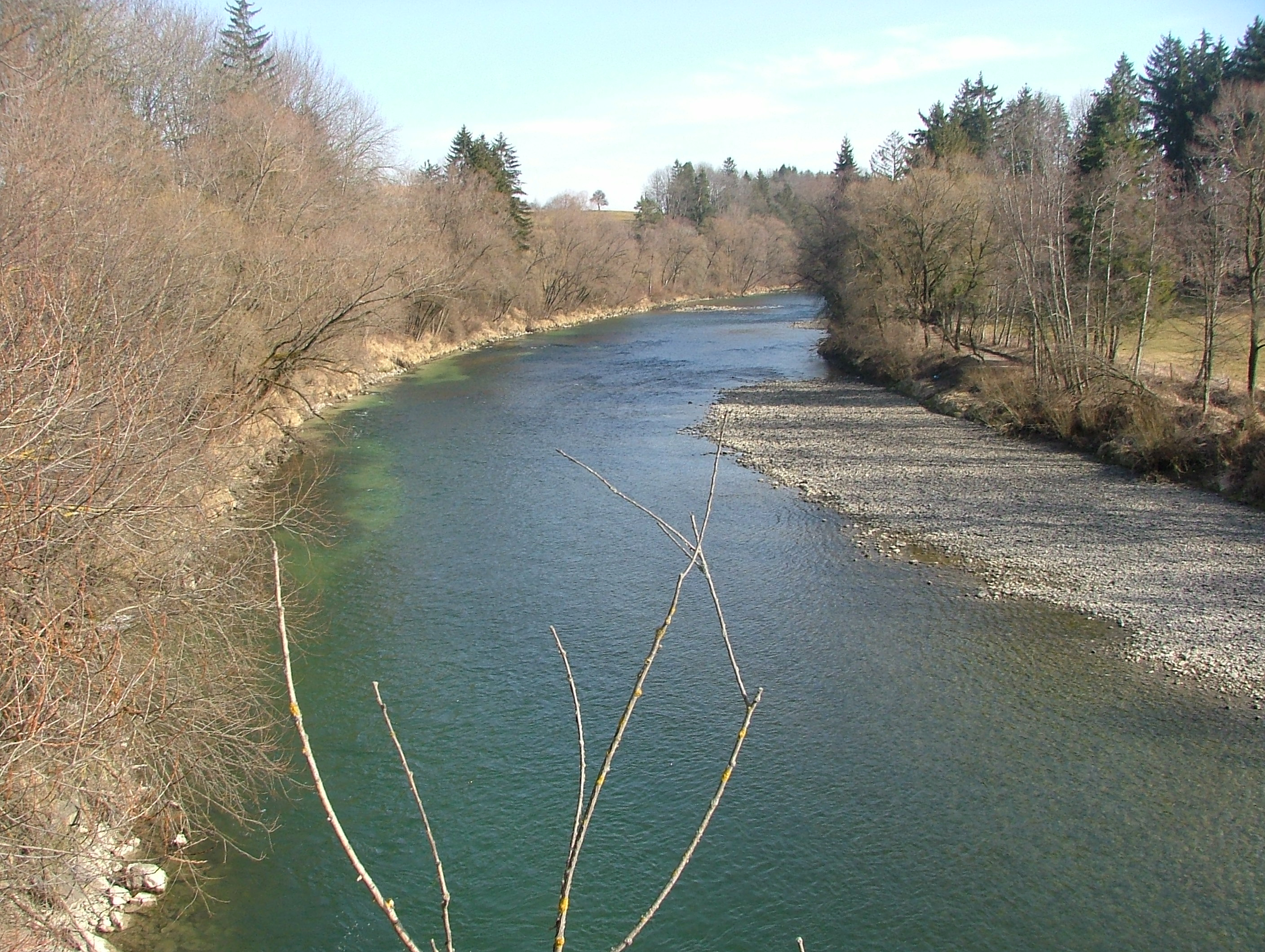 Lauben